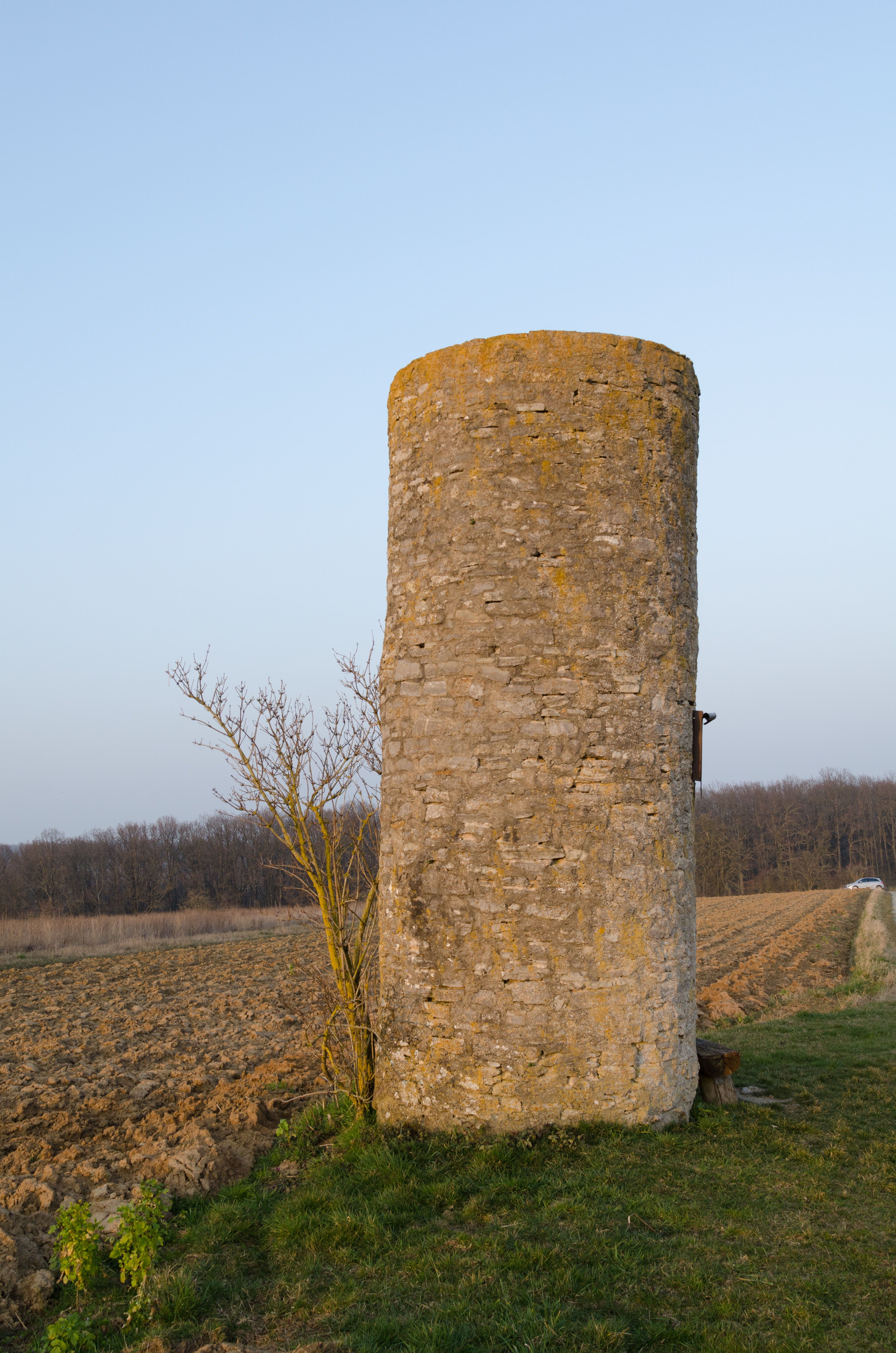 Poppenhausen, Kützberg, Wartturm